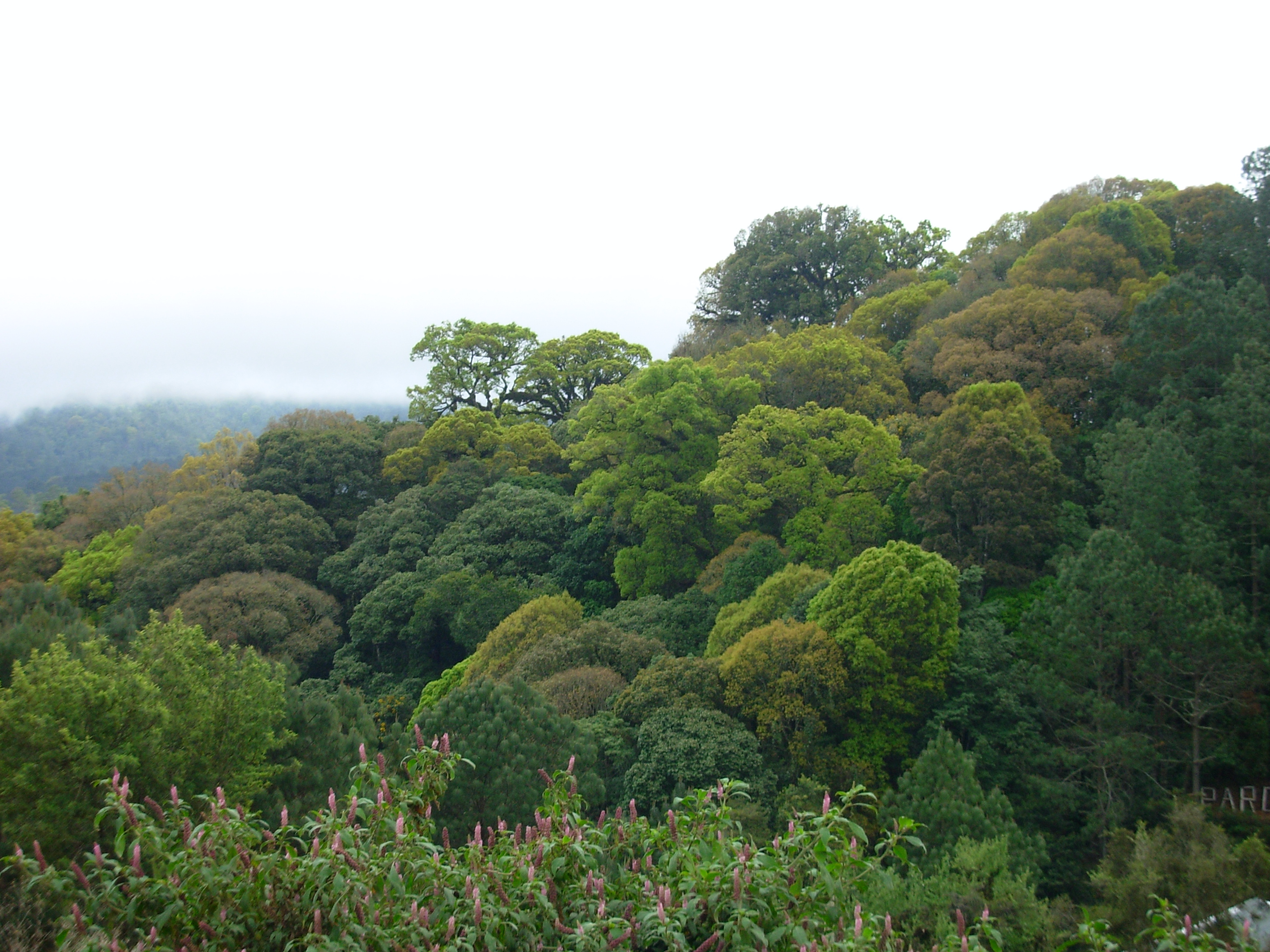 Bello bosque de variados tonos, ubicado entre Japala, San Yuyo y Mataquescuintla.